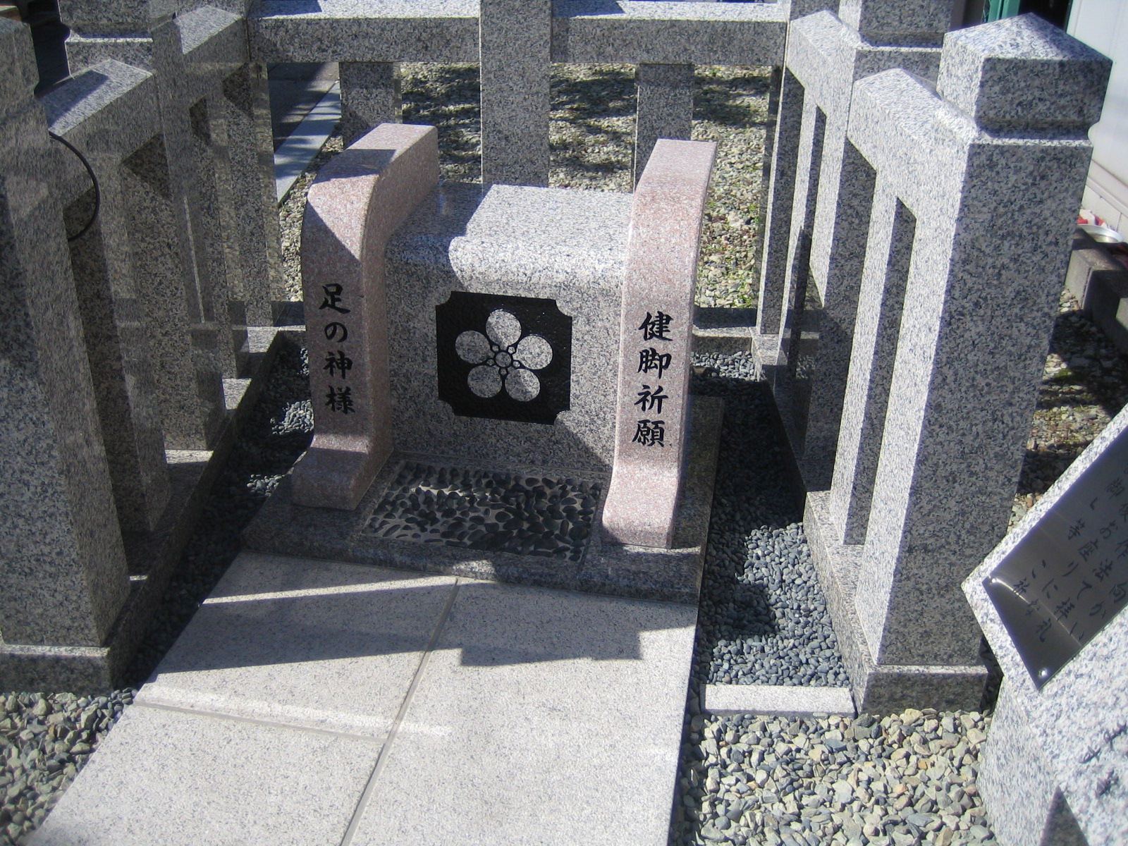 大阪府豊中市の服部天神宮にある「足踏み石」祈願台座